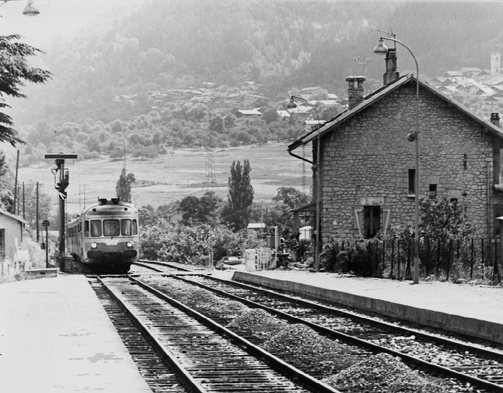 Autorail pour Chambéry et Lyon à Aime (Savoie) en juin 1978